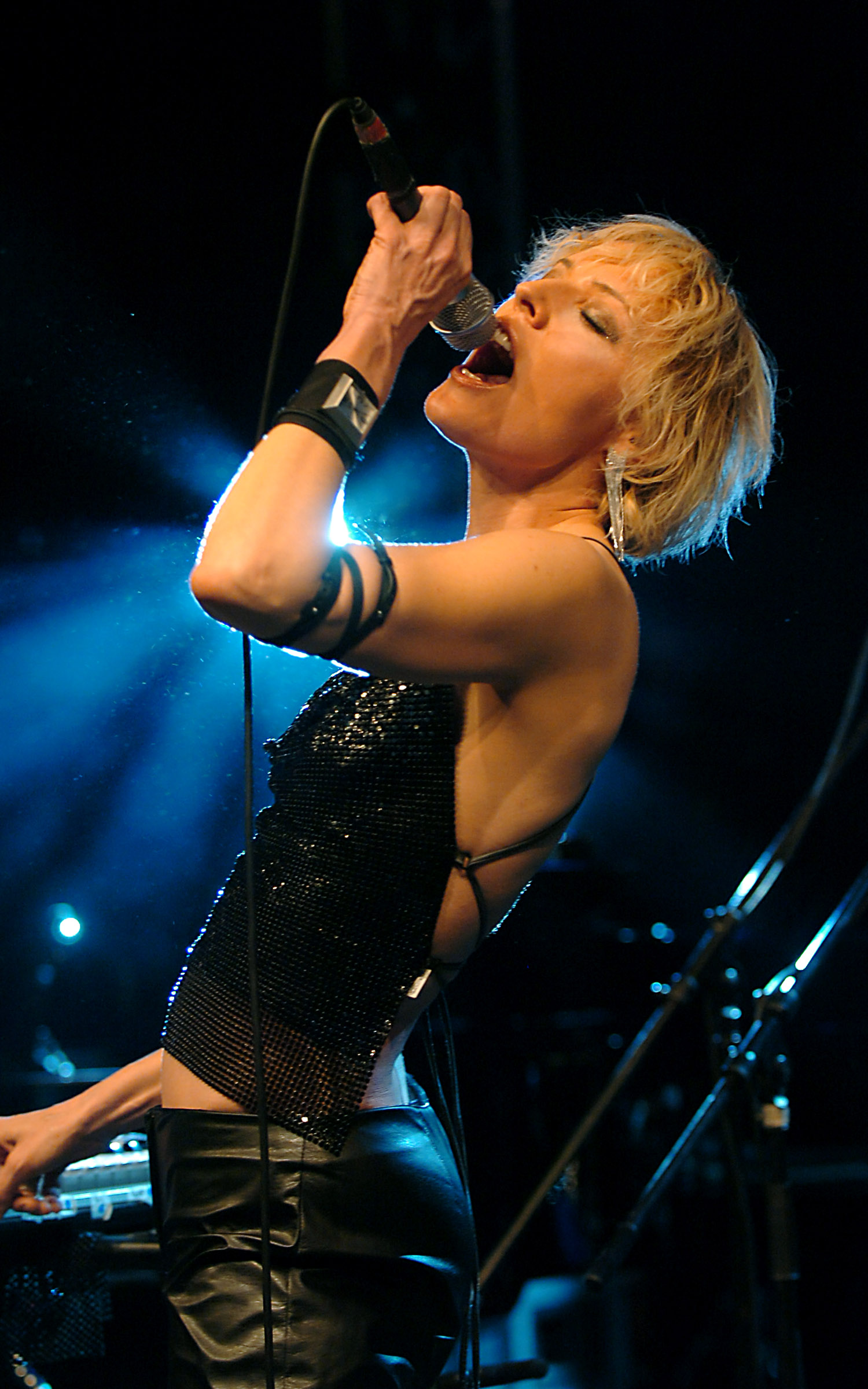 Informations générales nom de naissance Laurence Revey activité principale Auteure-compositrice-interprète productrice de musique comédienne et metteur en scène genre musical Pop, rock, électro, folk, années actives depuis 1997 Labels Naive, Sony Music, Rêve Prod Site officiel soundcloud/laurencerevey